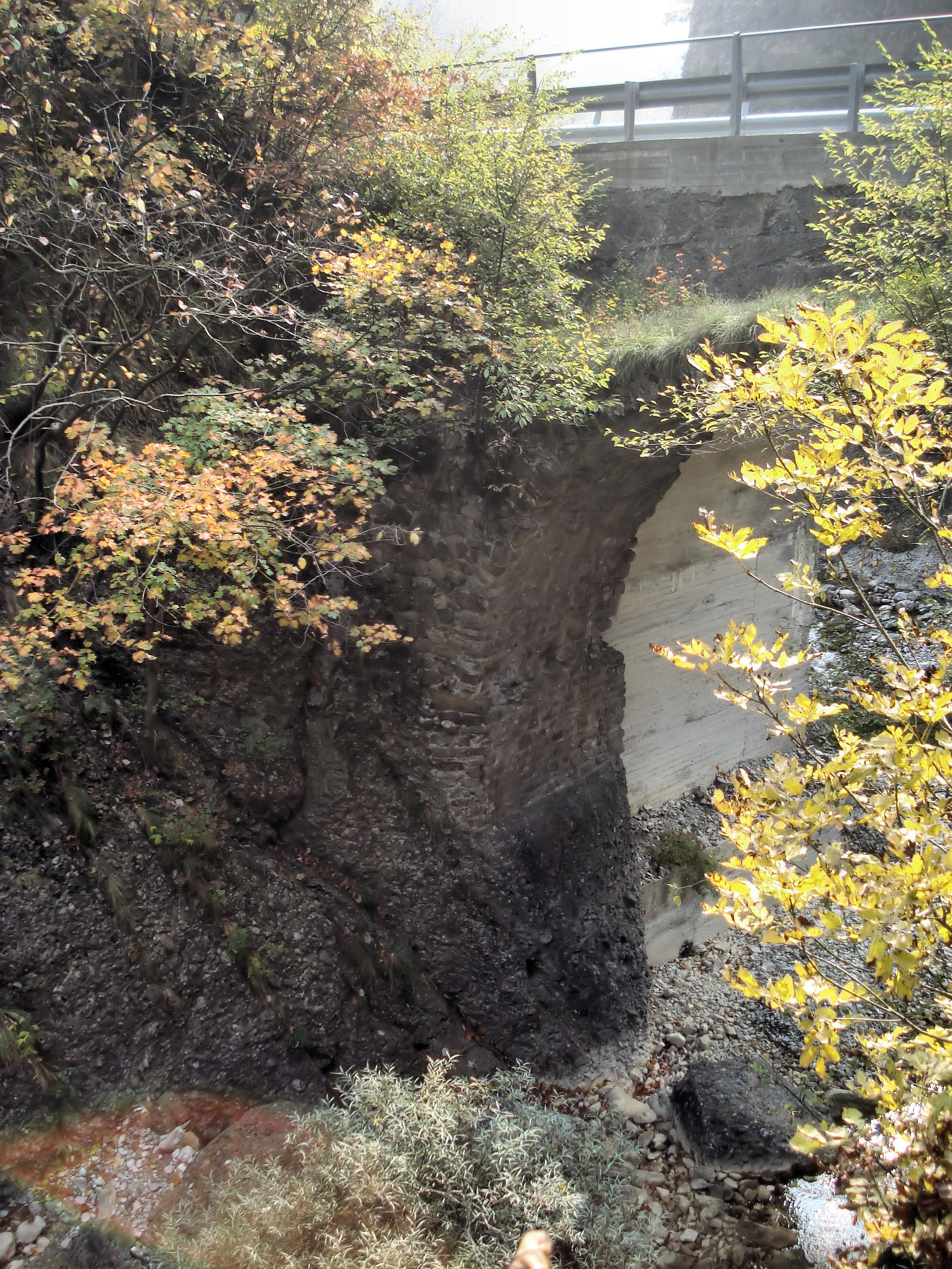 Cosmin latan,Ponte di Zan